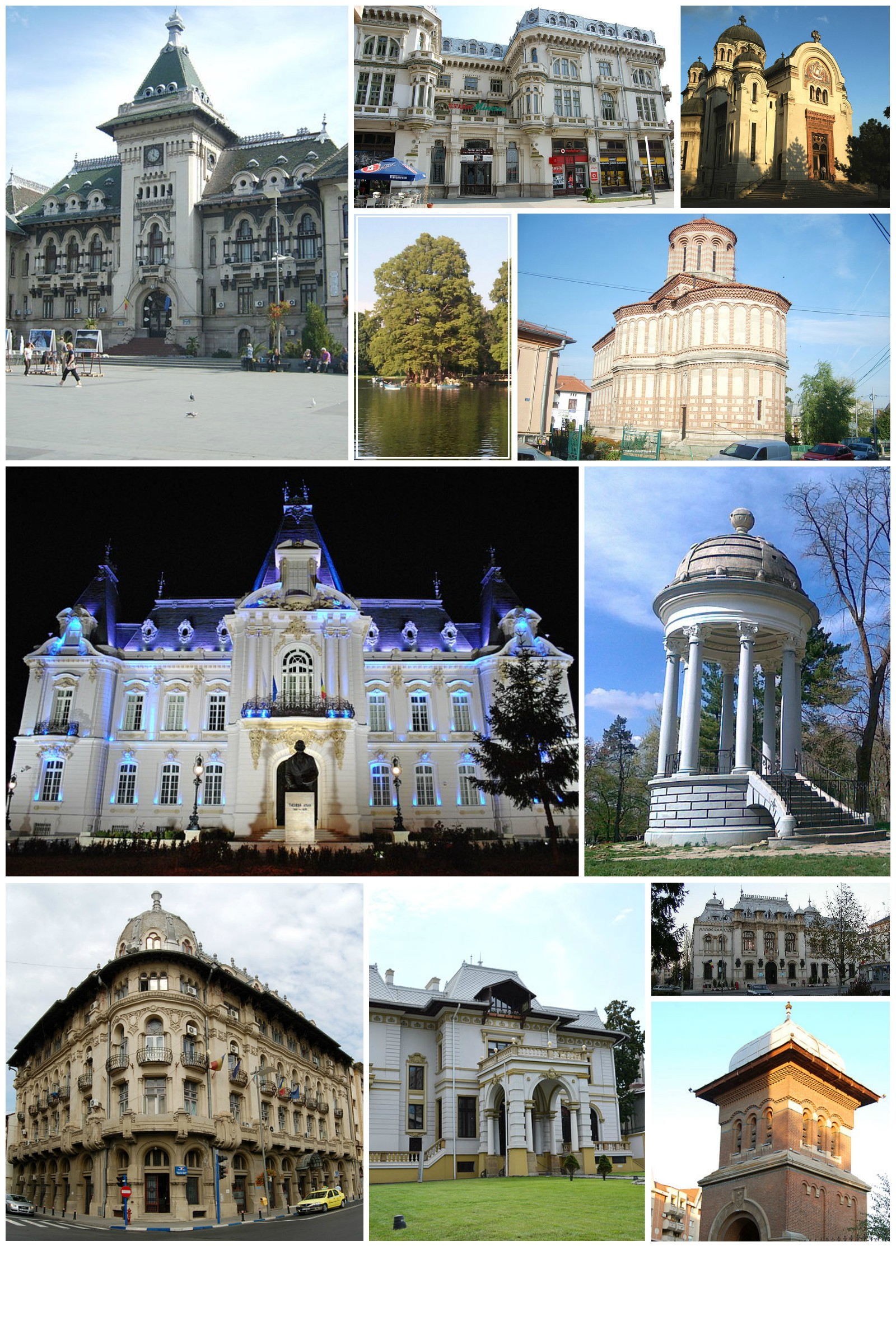 craiova